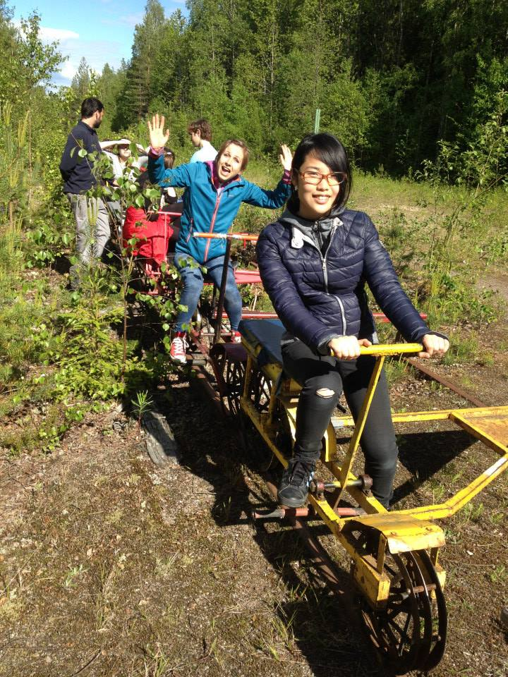 Iloisia leiriläisia Marttisessa 2015